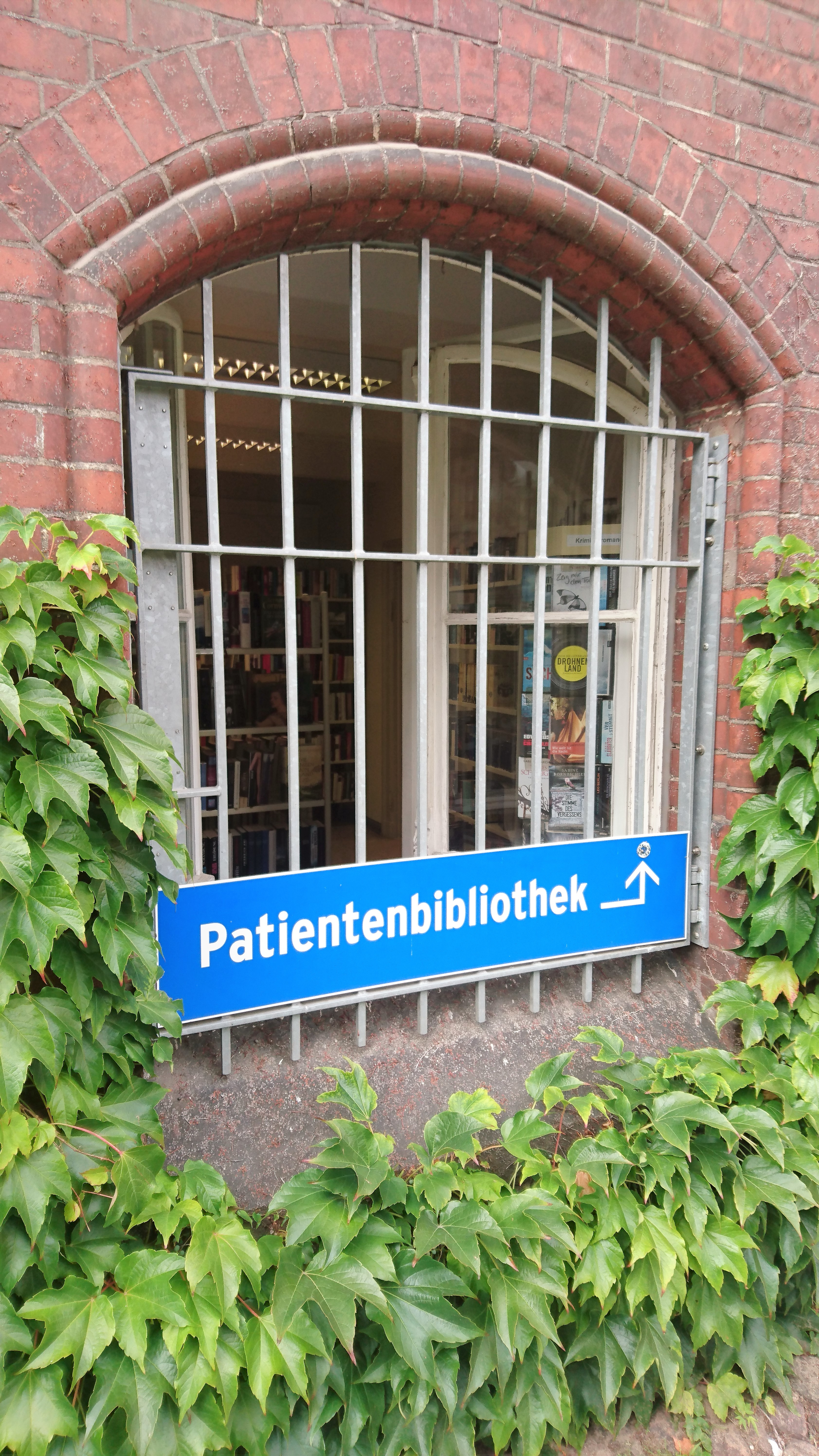 Fenster der Patientenbibliothek der Charité in Berlin Mitte, September 2017